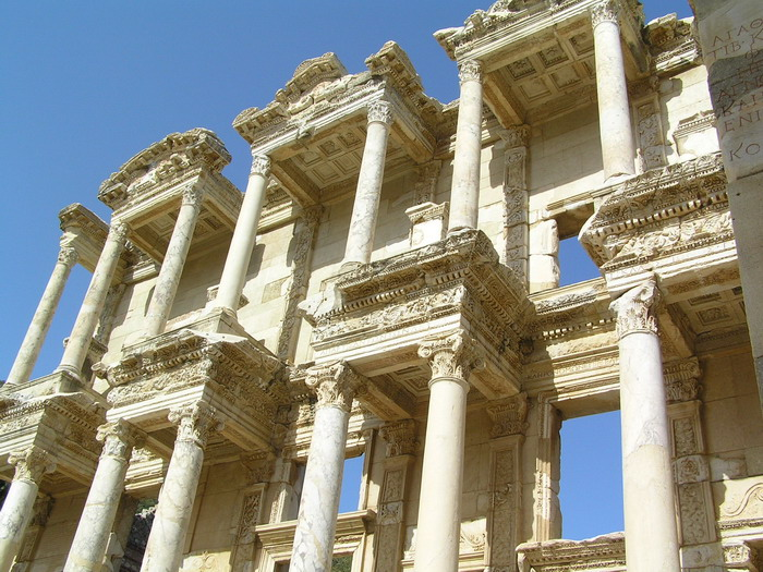 Fine Artemida